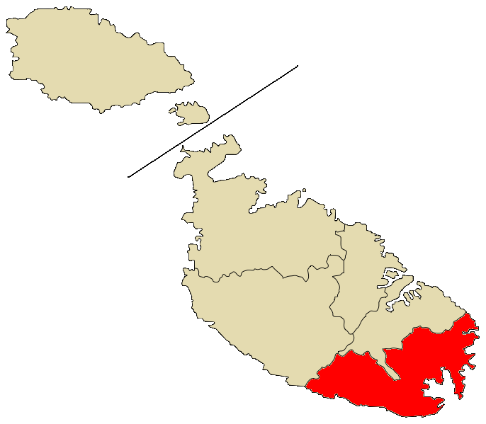 Mapa del Distrito del Sudeste, Malta.